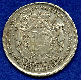 Münze: Silber-Taler, Hochstift Eichstätt / Fürstbischof Joseph von Stubenberg (1740-1824)